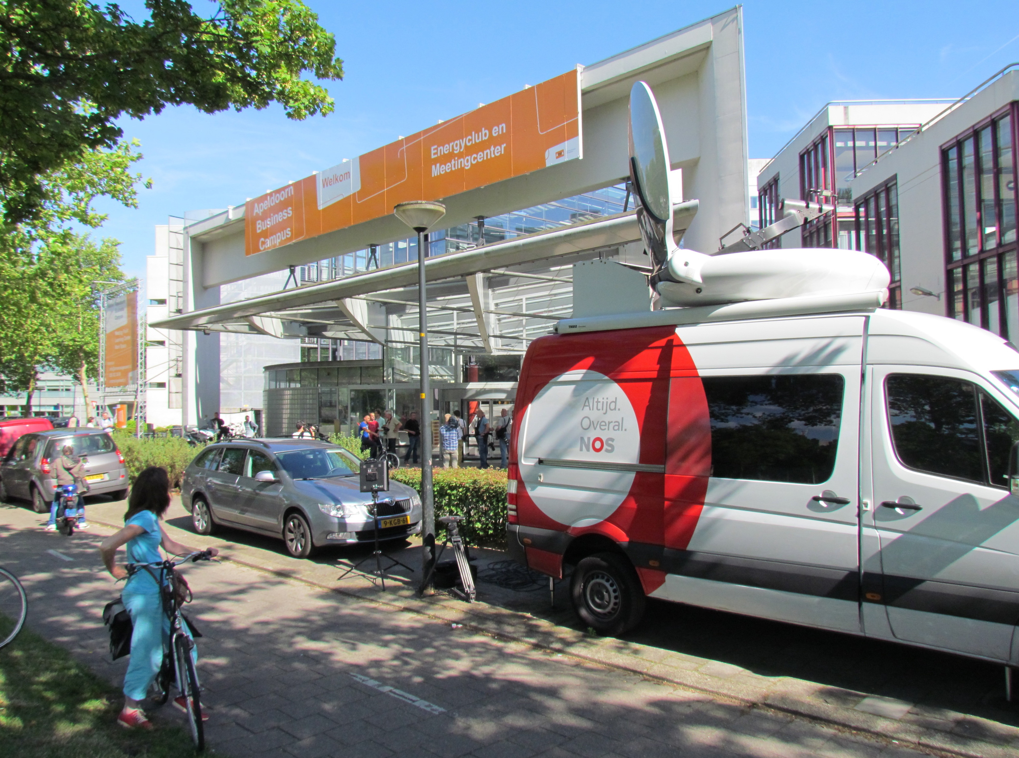 Aandacht van landelijke media en voorbijgangers bij de Apeldoorn Business Campus, waar een buurtbewonersbijeenkomst wordt gehouden in verband met de komst van Volkert van der Graaf naar het centrum van die stad.